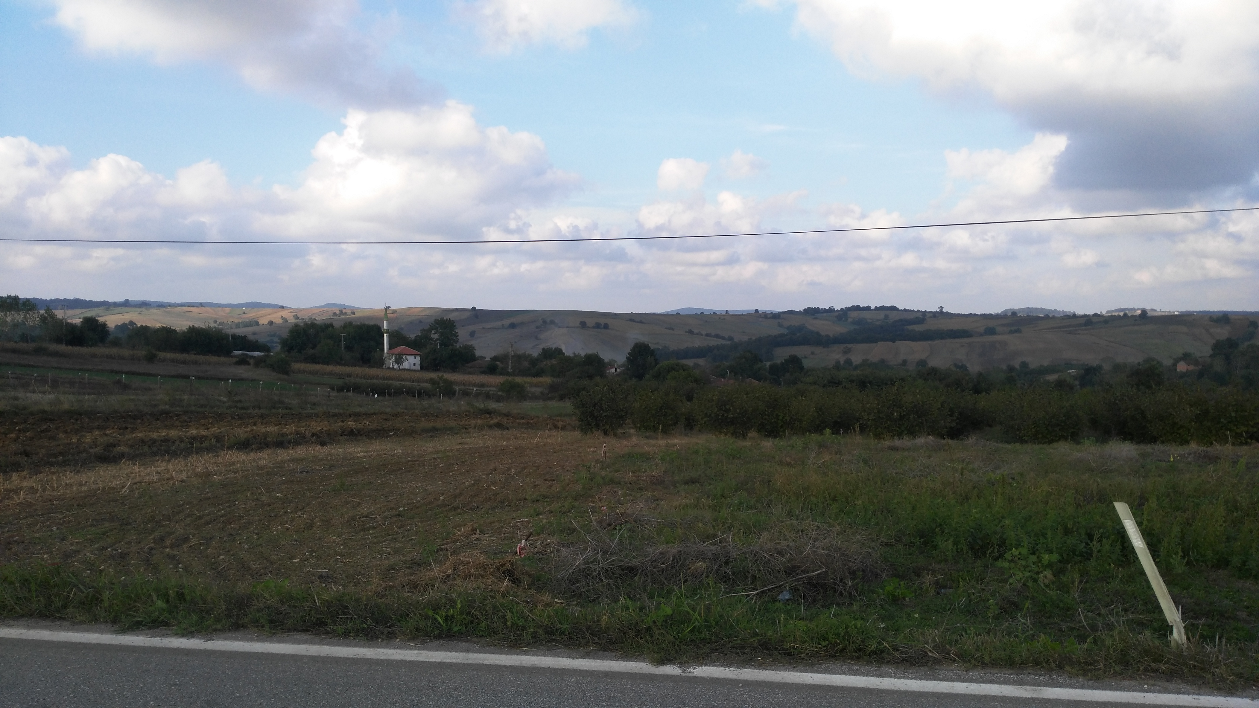 Kocaeli Platosu genel görünüm.